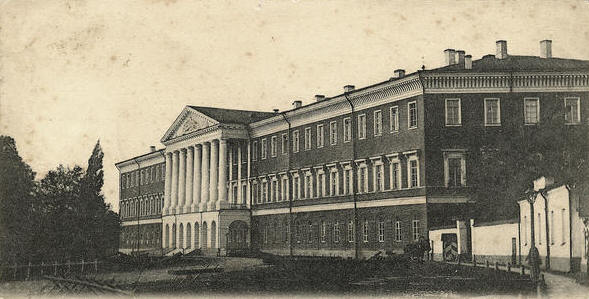 Петровський_Полтавський_кадетський_корпус_3.jpg: Петровський Полтавський кадетський корпус, початок 20 століття